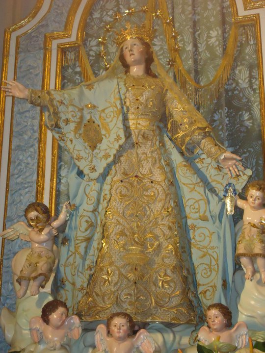 La Statua dell'Assunta di Antonio Migliorini venerata della Basilica di Santa Maria Maggiore in Santa Maria Capua Vetere (Ce).